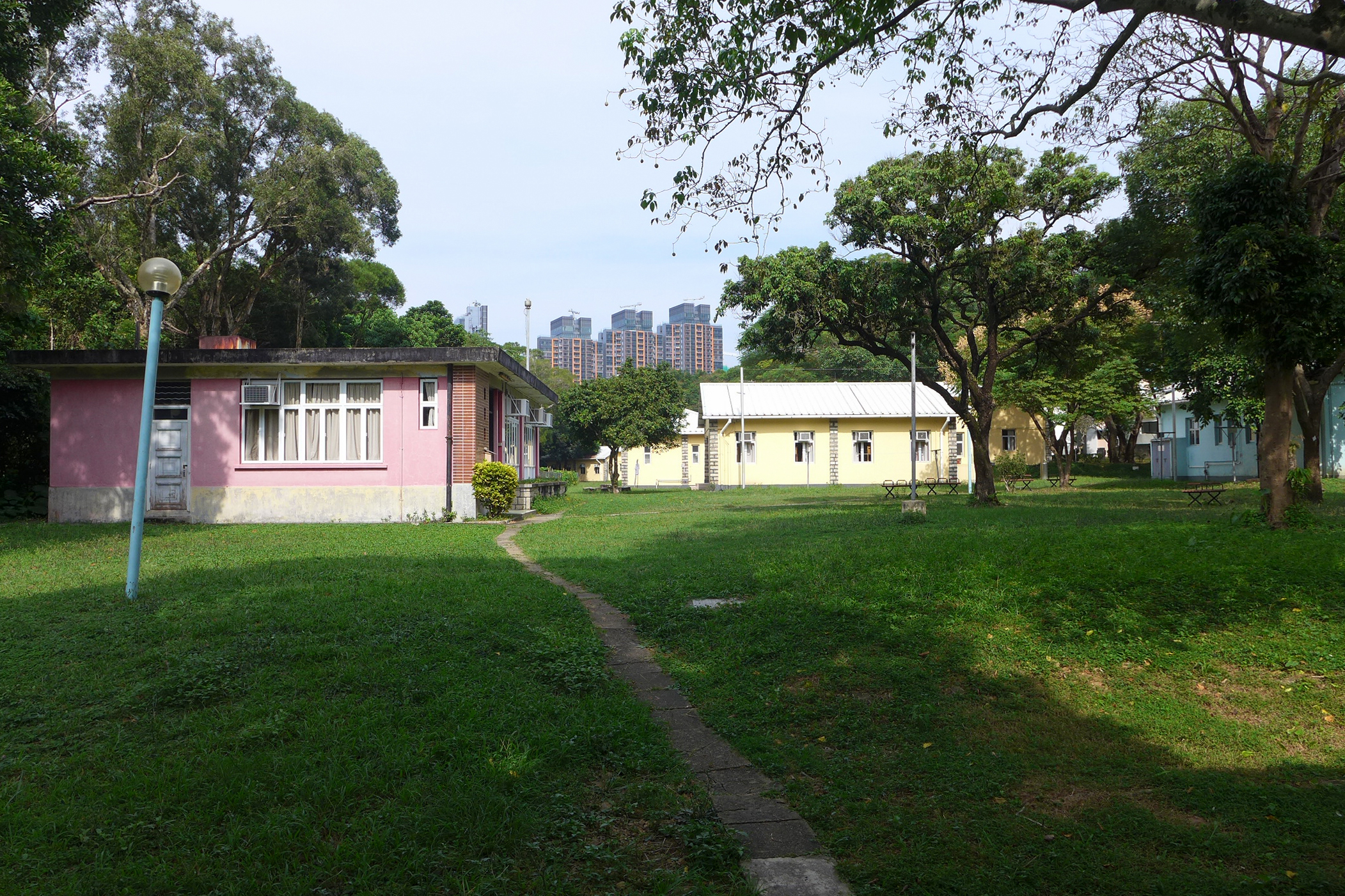 Wu Kwai Sha Youth Village